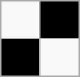 Полотняное переплетение.